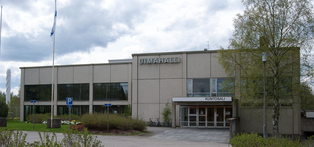 Kuopion uimahalli on valmistunut vuonna 1969, ja sen on suunnitellut arkkitehti Esa Malmivaara.